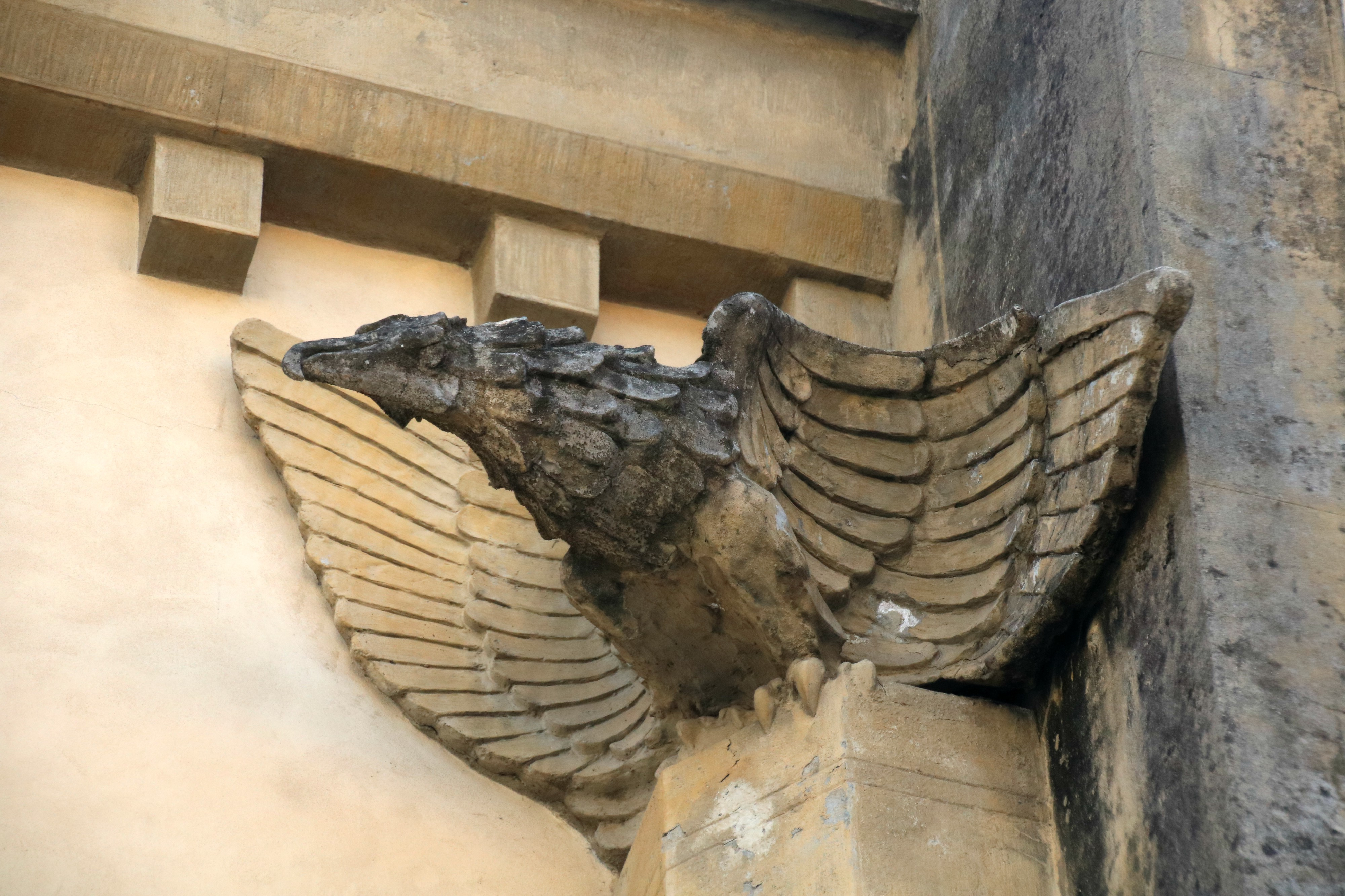 Sezione di Archivio di Stato di Pescia This is a photo of a monument which is part of cultural heritage of Italy.